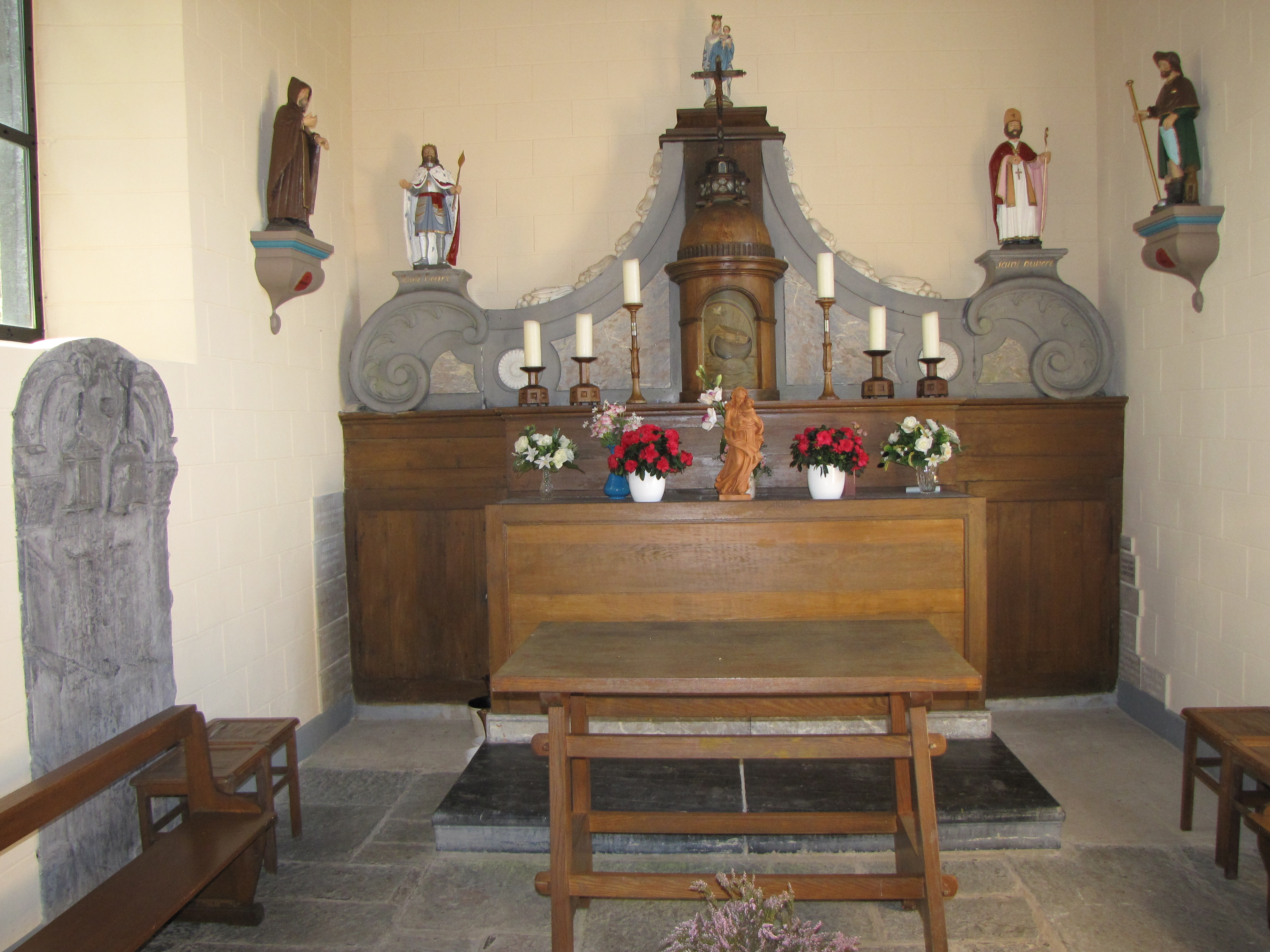 Construite en 1830-1831 par un industriel de Malmedy Henri-Toussaint Fischbach. Les tenanciers de l’auberge de la Baraque Michel allumaient le fanal chaque soir pour aider les voyageurs égarés sur la Fagne. Ces images datent de 2011 après sa restauration complète.